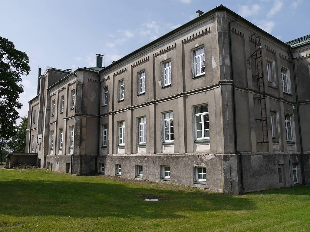 Фасад дворца, по состоянию на 2015 год. В настоящее время там расположена школа.